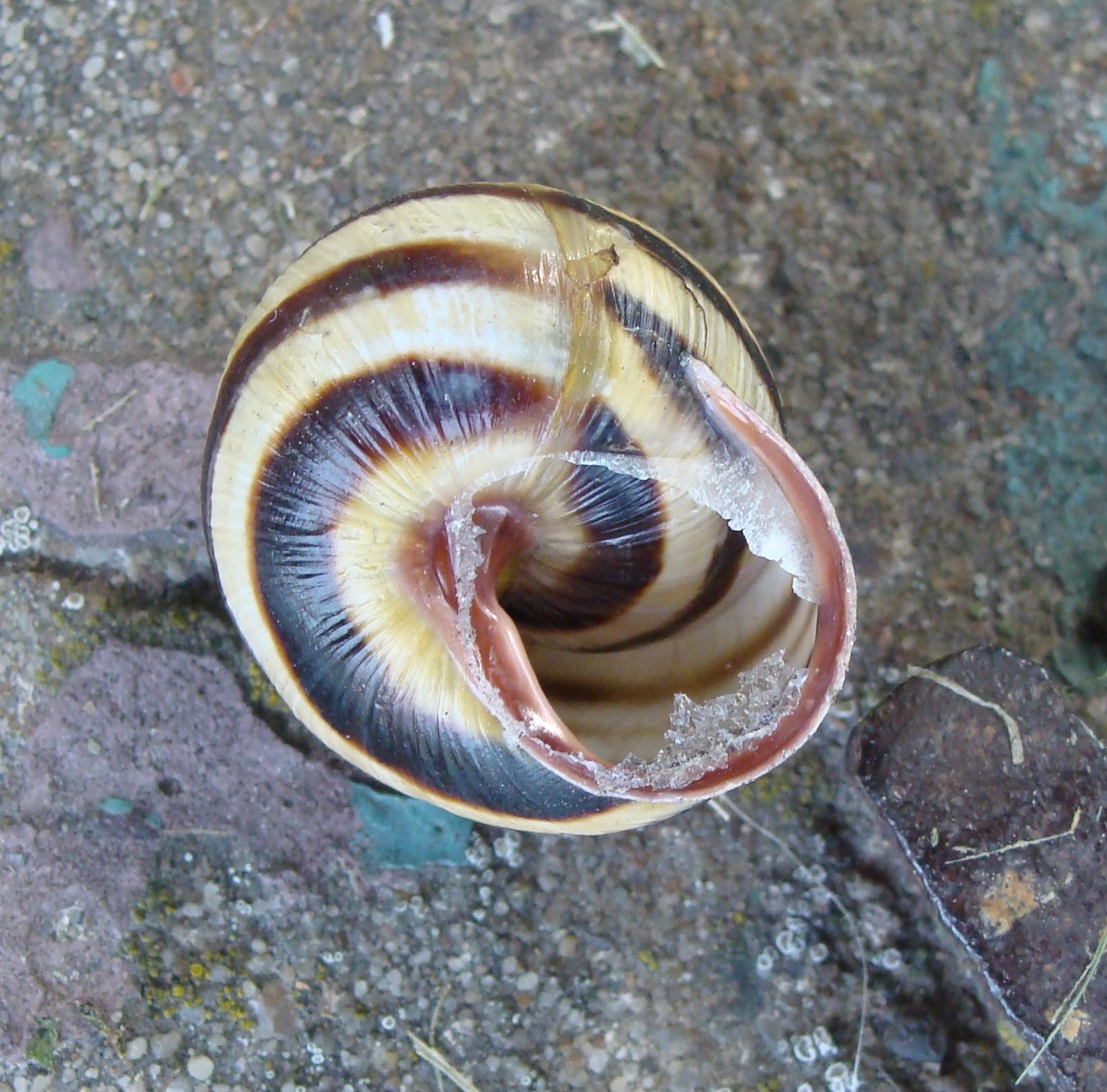 Wstężyk austriacki Cepaea_vindobonensis